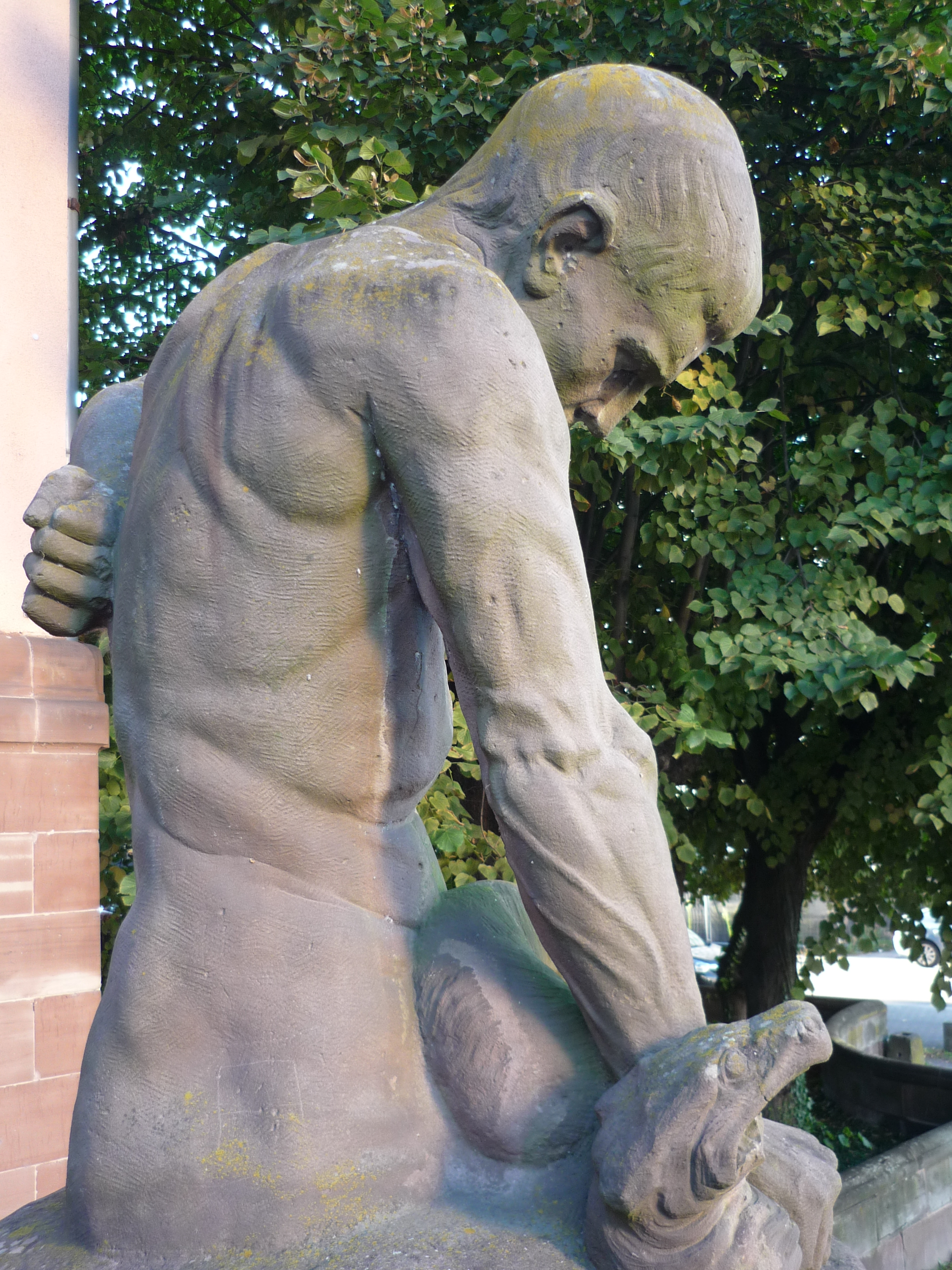 Allégorie de la maladie, un homme terrassant un serpent (1919), statue d'A. Marzolff en hommage à Pasteur à l'Institut de Bactériologie,3, rue Koeberlé, Strasbourg.